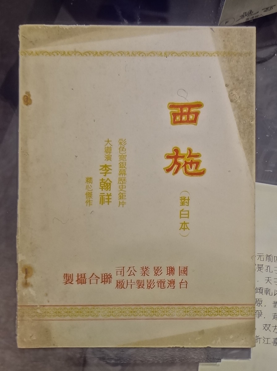 金馬50風華展展示的臺灣省電影製片廠與國聯影業合拍電影《西施》劇本。